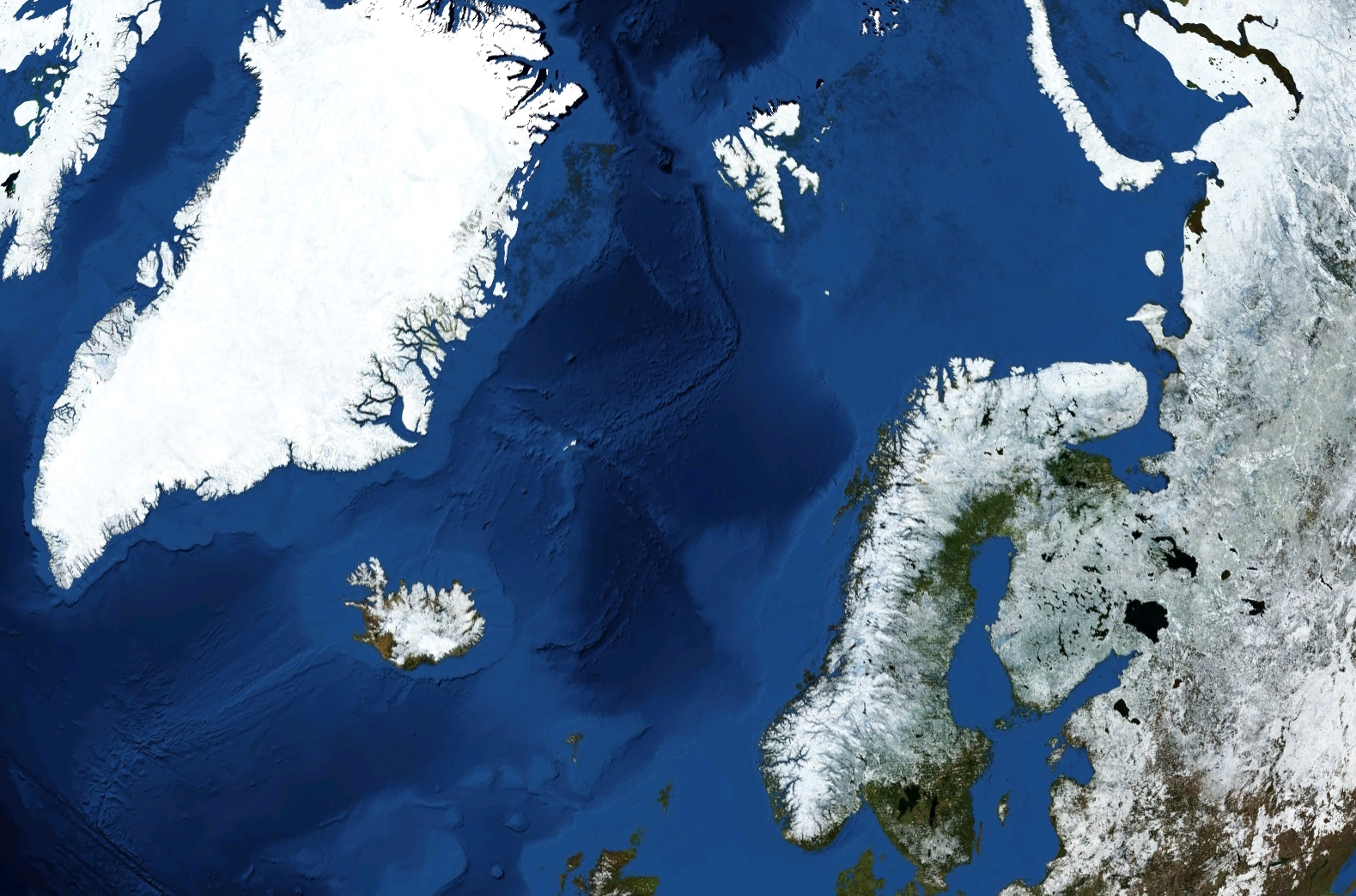 Norwegian Sea